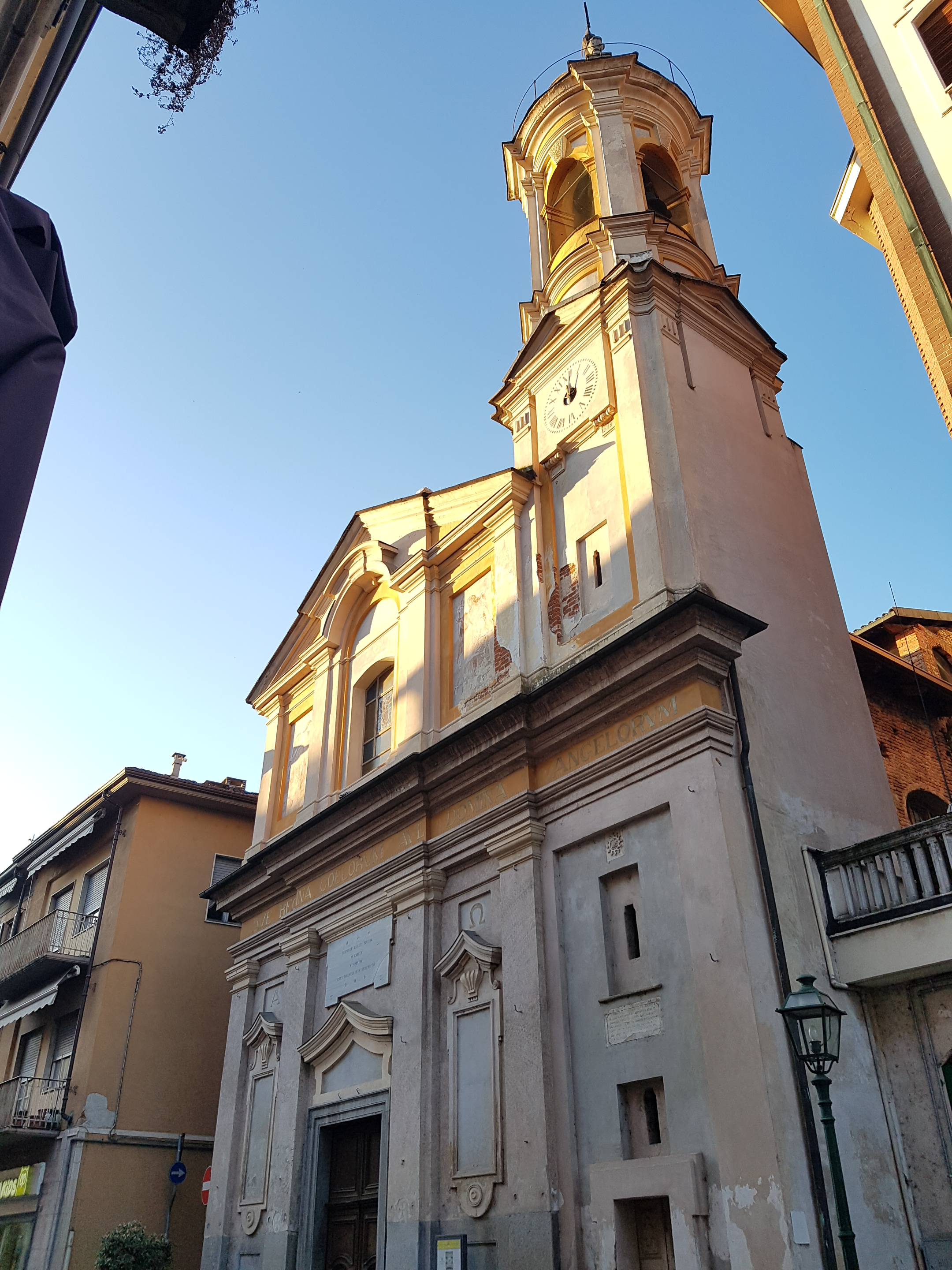 Santa Maria degli Angeli (XV sec., XVIII sec.), Chivasso, Piemonte